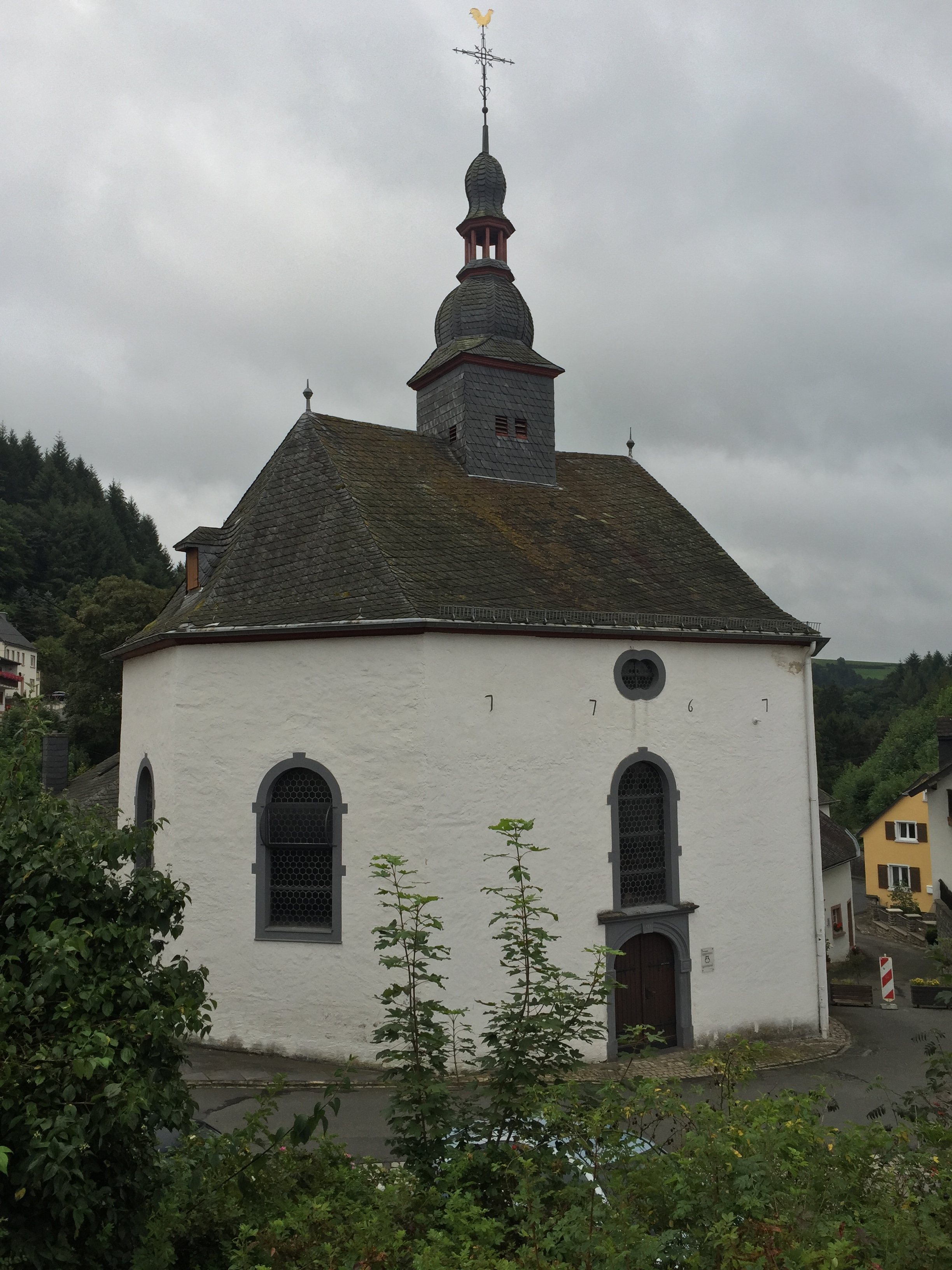 Iglesia del apóstol Santiago en Dasburg.